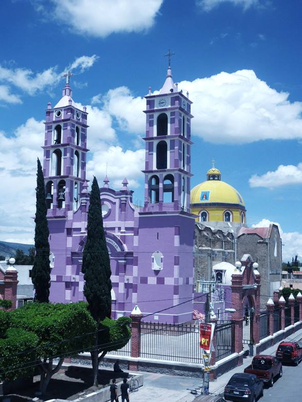 Vista actual de la Parroquia Jesús de las Maravillas, uno de las joyas arquitectónicas de la población, protegida bajo las leyes del Instituto Nacional de Antropología e Historia (INAH).